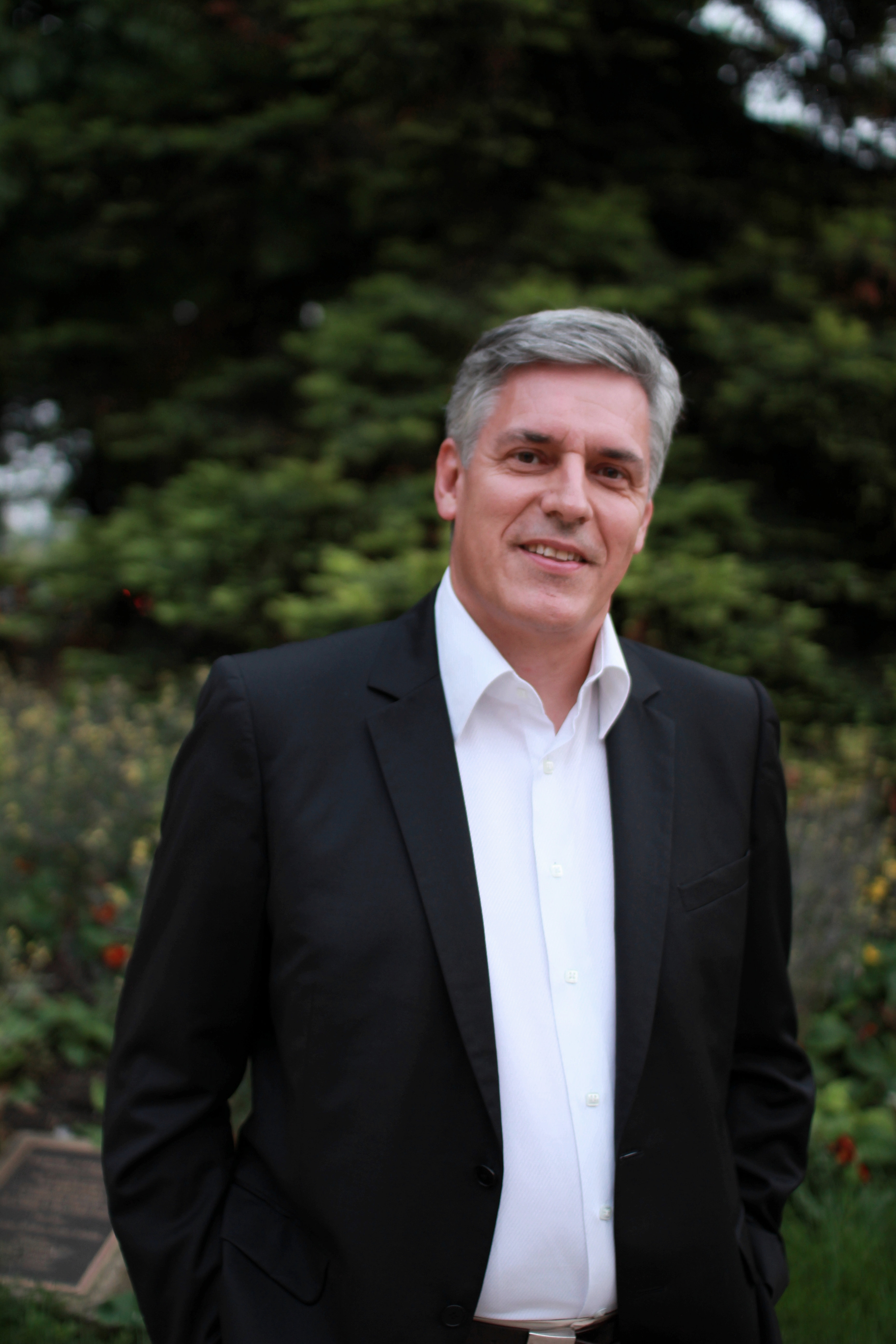 Monsieur Christian bader